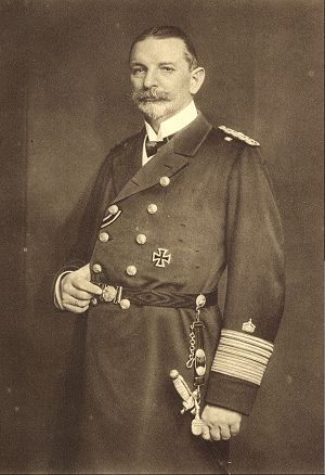 Eduard von Capelle, German Navy Minister in 1916-1918